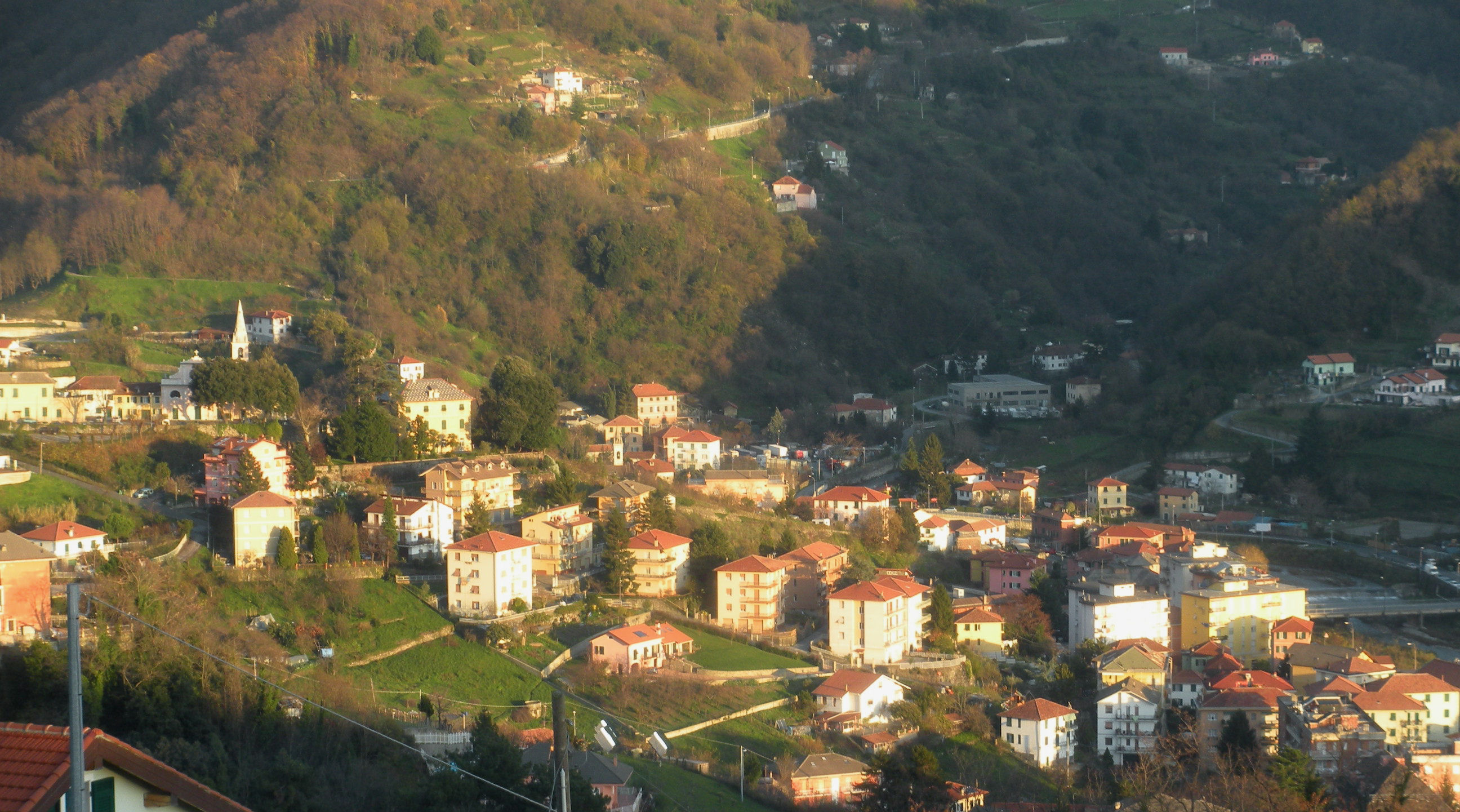 Veduta di Pedemonte (Serra Riccò, Genova) Foto propria Novembre 2009 Licensing Categoria:Serra Riccò